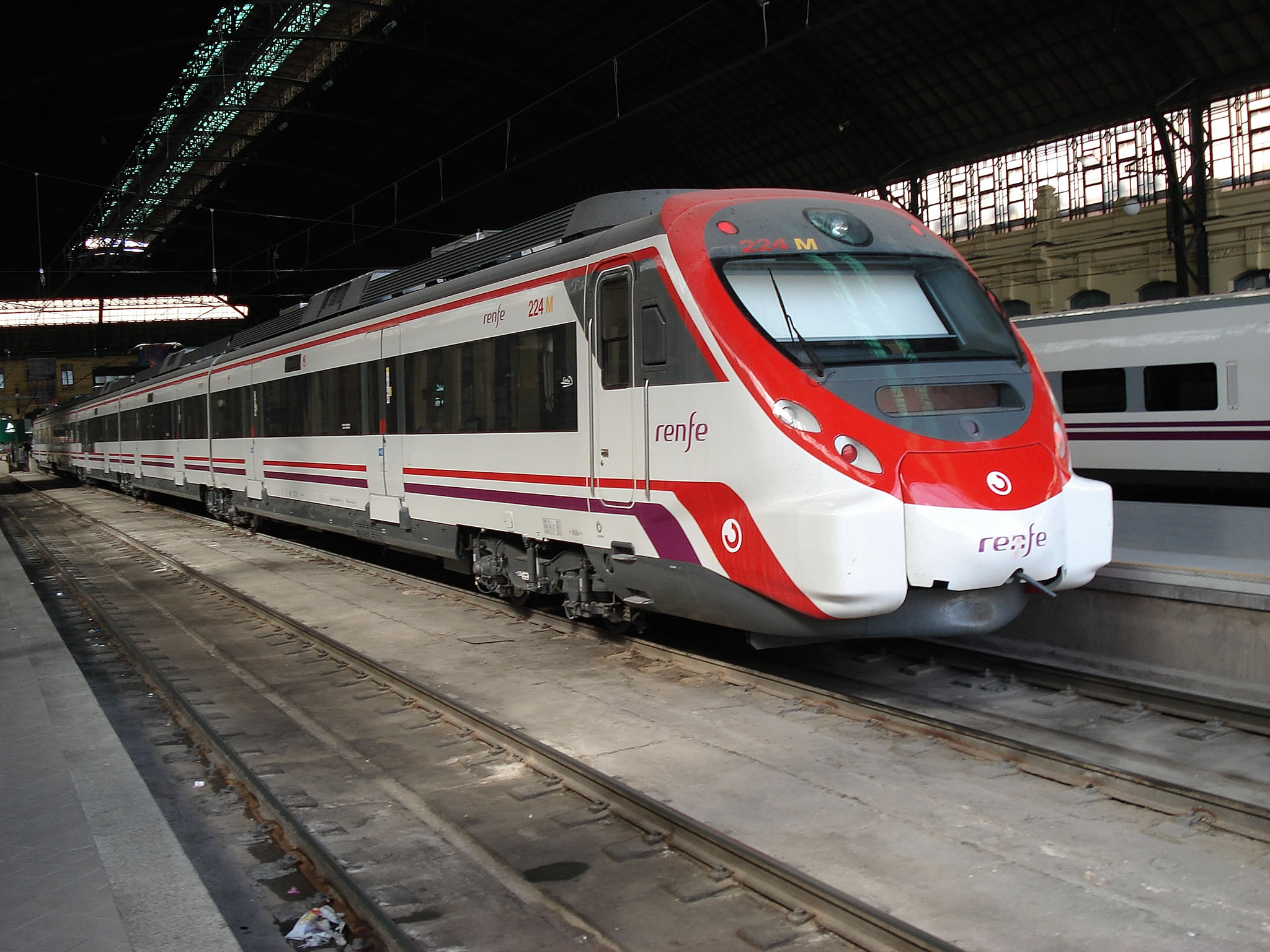 Un tren Civia en algunos de estos núcleos de Cercanías.